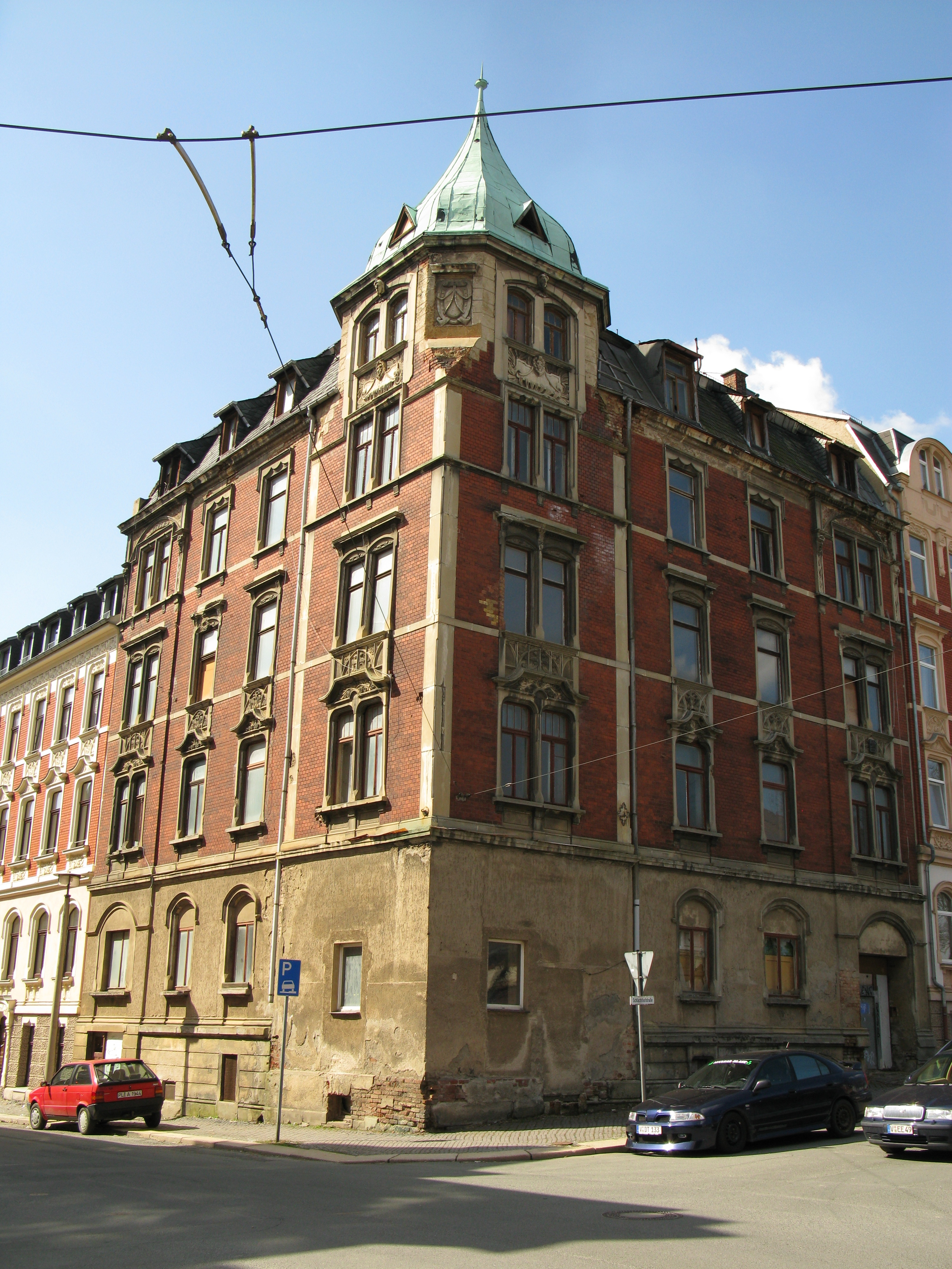 Plauen, denkmalgeschütztes Haus in der Schlachthofstraße, Ecke Breitscheidstraße (Schlachthofstraße 10).